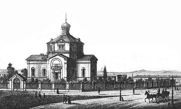 Хрестовоздвиженська церква, Одеса, Пересип. Збудована у 1859 р. в кінці вулиці Московської (тепер Чорноморського козацтва). Зруйнована більшовиками.